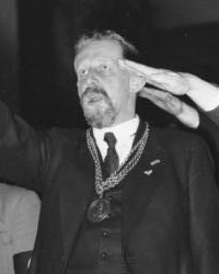 Berlin, Kundgebung an der Universität Scherl: Kundgebung der Studenten in der Neuen Aula der Universität gegen Prager Uebergriffe. Während der Nationalhymnen. In der Mitte der Rektor Prof. [Eugen] Fischer, links der Führer des Nationalsozialistischen Deutschen Studentenbundes, Derichsweiler, rechts Prof. [Franz] Bachér. 1934.